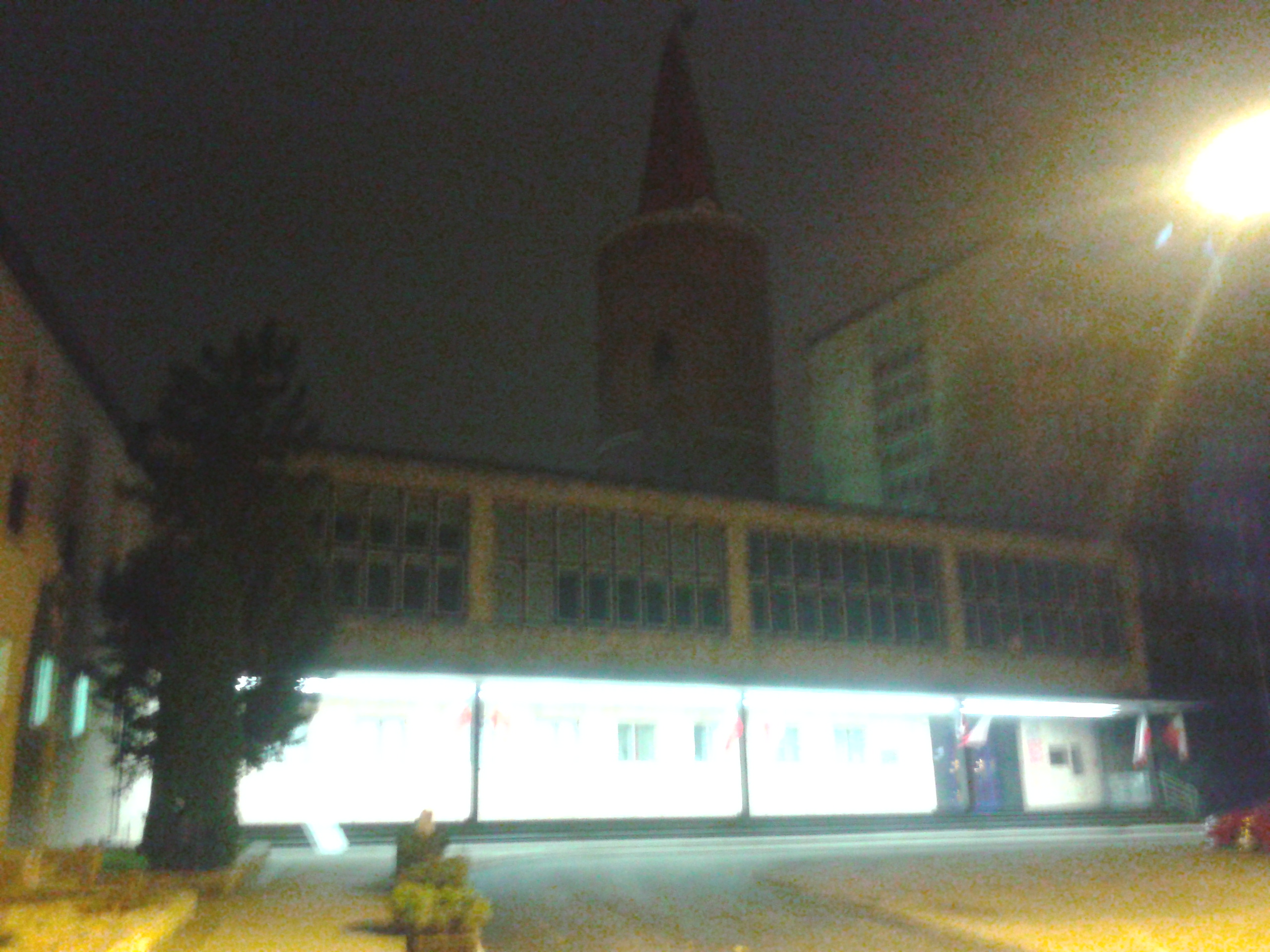 Siedziba urzędu wojewódzkiego i sejmiku opolskiego nocą.